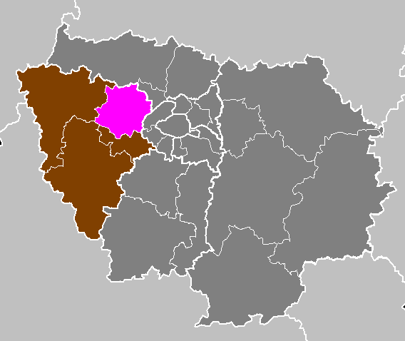 Maps of arrondissements and cantons of France: Département des Yvelines - Arrondissement de Saint-Germain-en-Laye.PNG (Région Île-de-France)